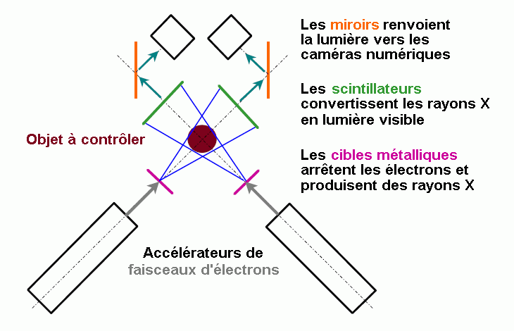 Principe de fonctionnement du DAHRT (Dual-Axis Radiographic Hydrodynamic Test facility) Travail personnel à partir d'une image du domaine public (Laboratoire National de Los Alamos, dépendant du Gouvernement fédéral des États-Unis)